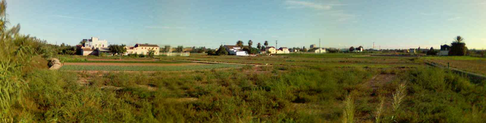 Huerta en la ciudad de Valencia (Comunidad Valenciana)